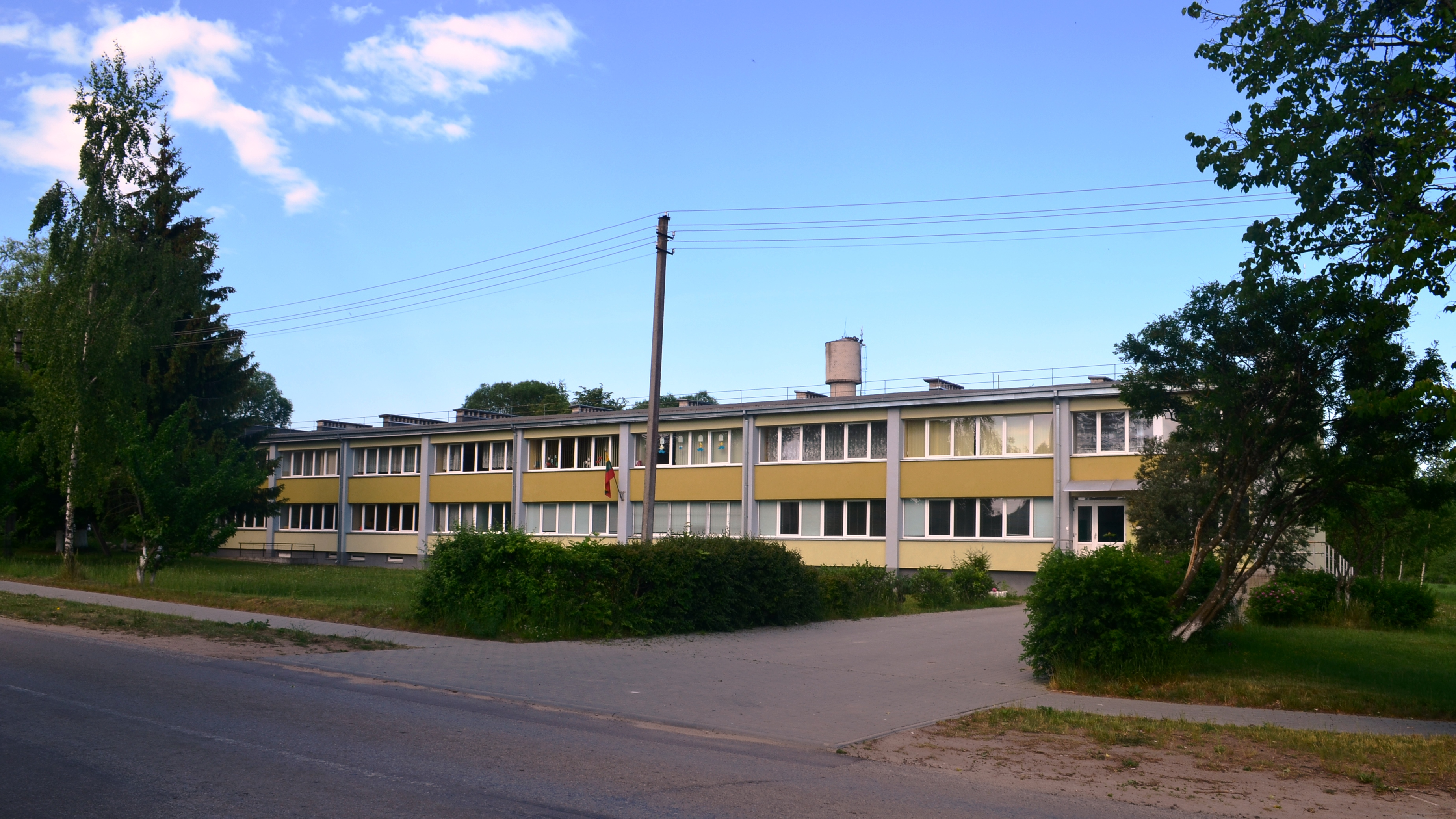 Sužionių pagr. mokyklos ikimokyklinio ugdymo skyrius, Vilniaus raj.